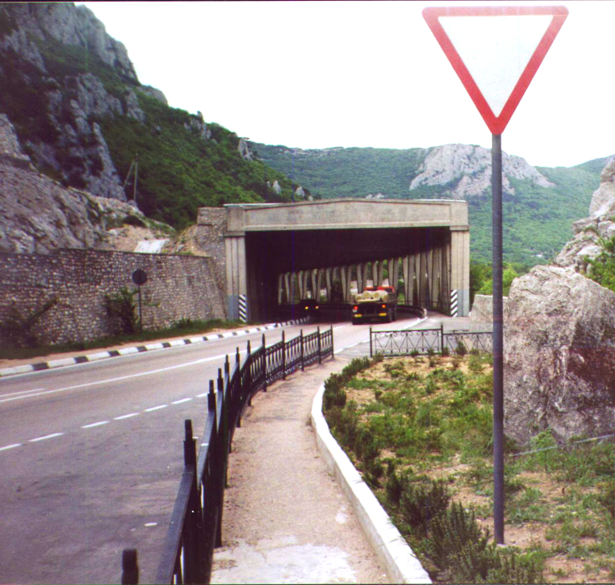 Kontraŭlavanga ŝirmilo sur aŭtomobila vojo ĉe Faros en Krimeo, Ukrainio, 2004. Mi, aŭtoro de la bildo, permesas al ĉiuj uzi ĝin kun ĉi tiuj kondiĉoj: La fonta bildo de ĉi tiu bildo estas ankaŭ en mia propra retpaĝaro [1]